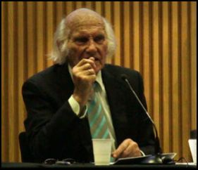 Salvador Freixedo en un Congreso.